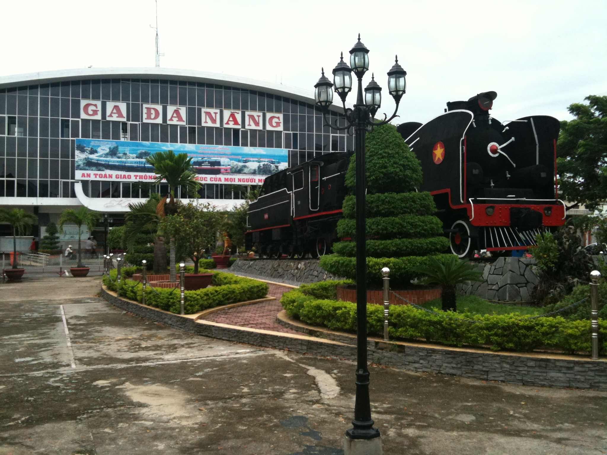 Da Nang Railway Station.